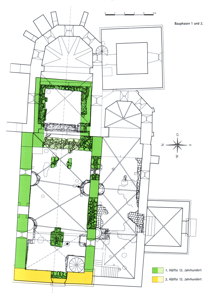 Bauphase 1 und 2 der Kirche von Altlichtenwarth